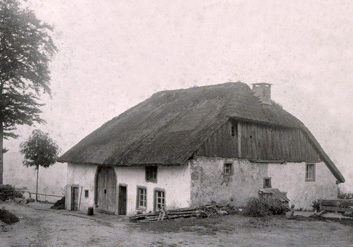 . Belmont, 1906, maison paysanne, toit de chaume. Bibliothèque nationale et universitaire de Strasbourg